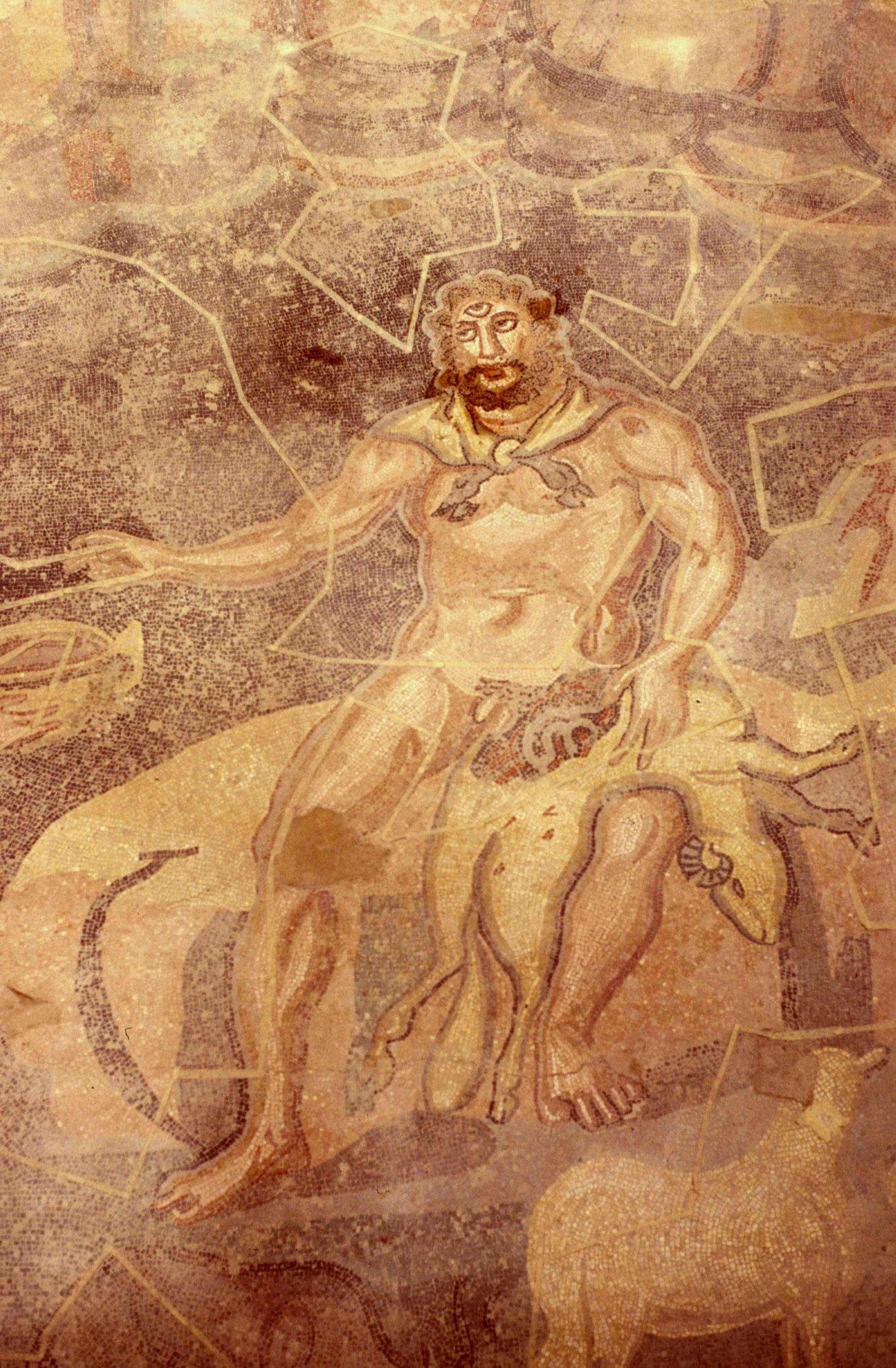 Sicile Piazza Armerina Villa Romana Mosaique